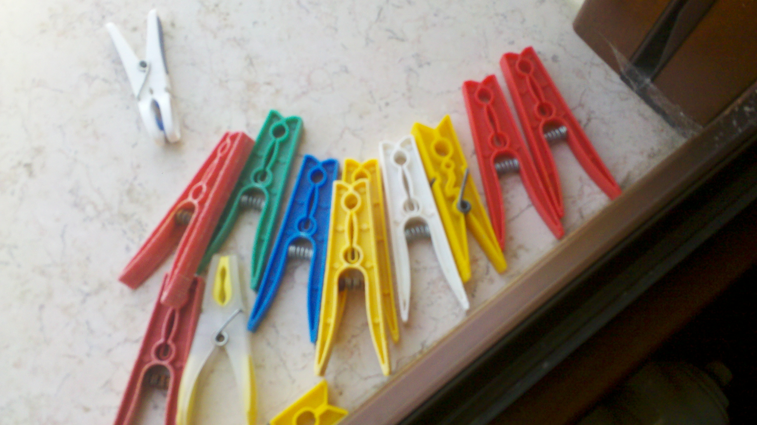 Mollette colorate in Italia